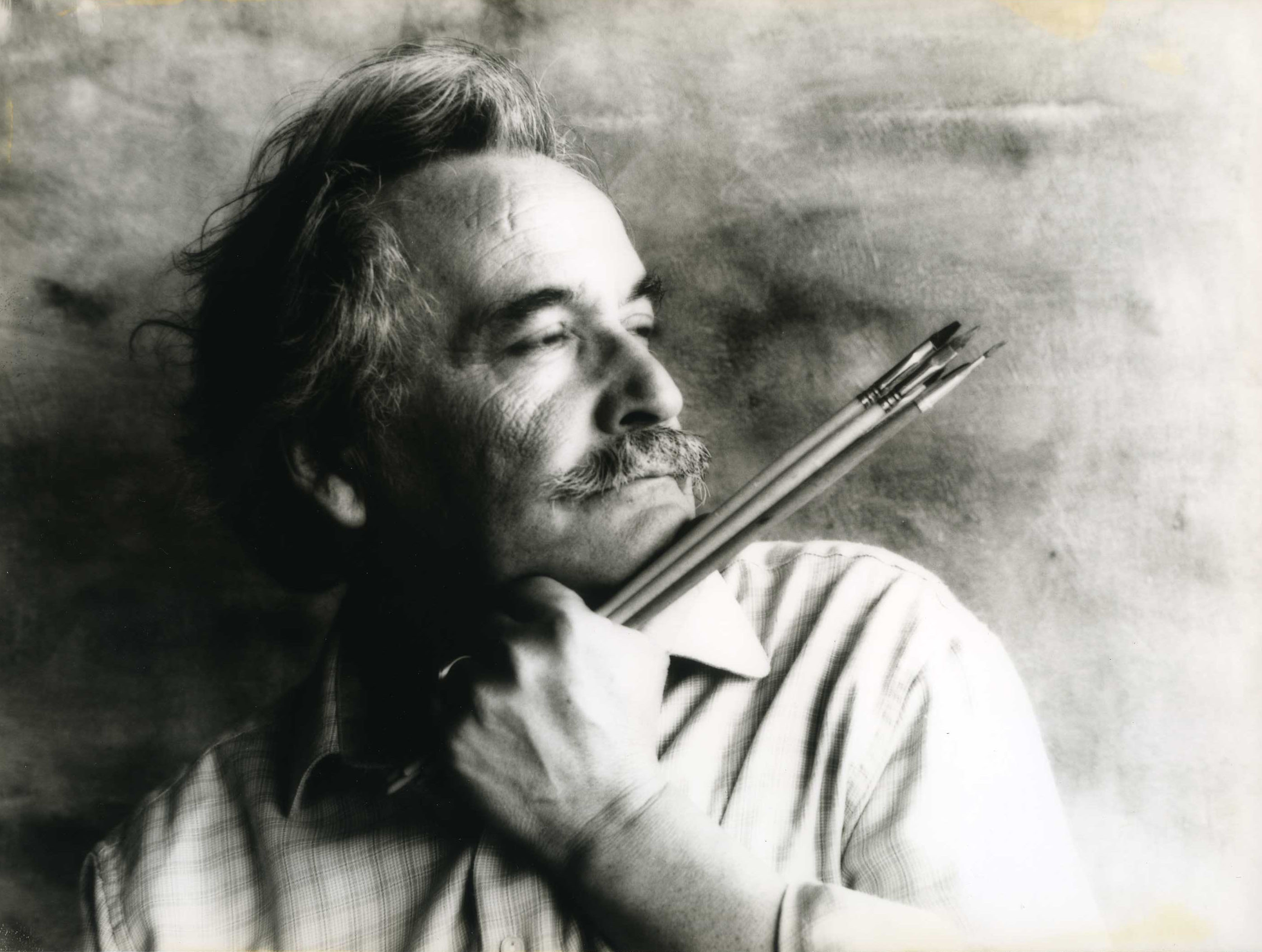 Carmelo García Barrena